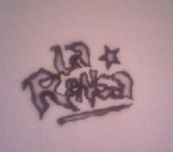 La Renga